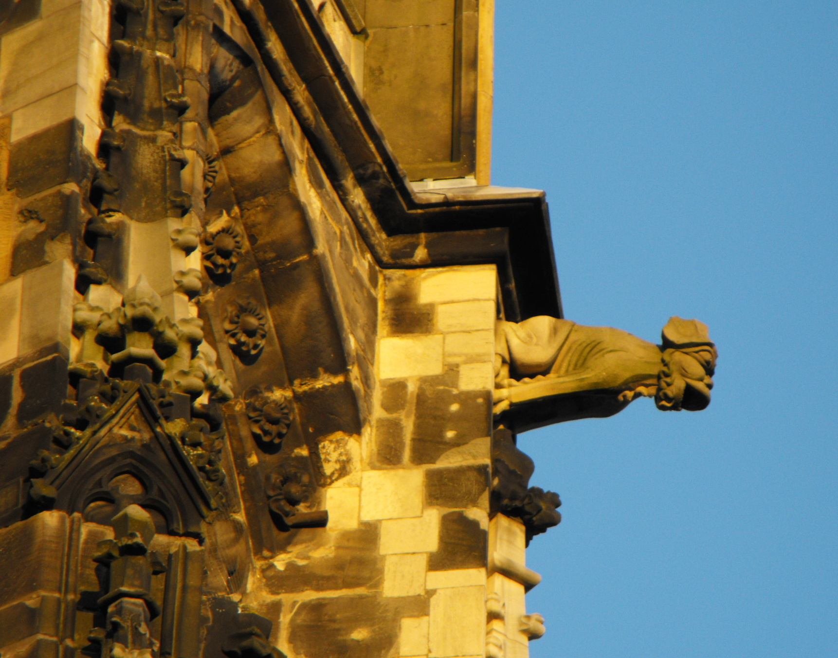 Wasserspeier an der gotischen Chorhalle des Aachener Domes